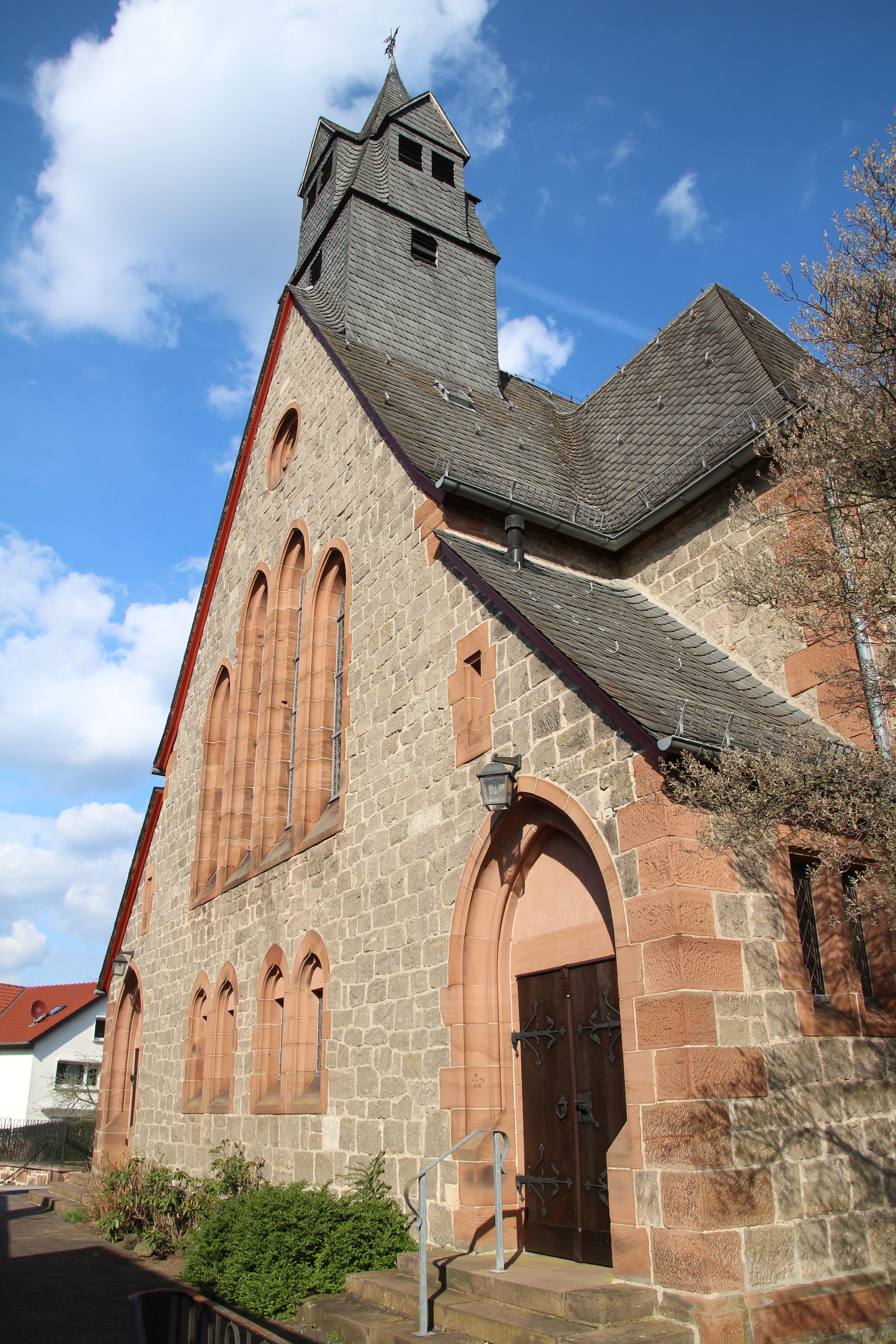 Siehe Bild und Dateiname